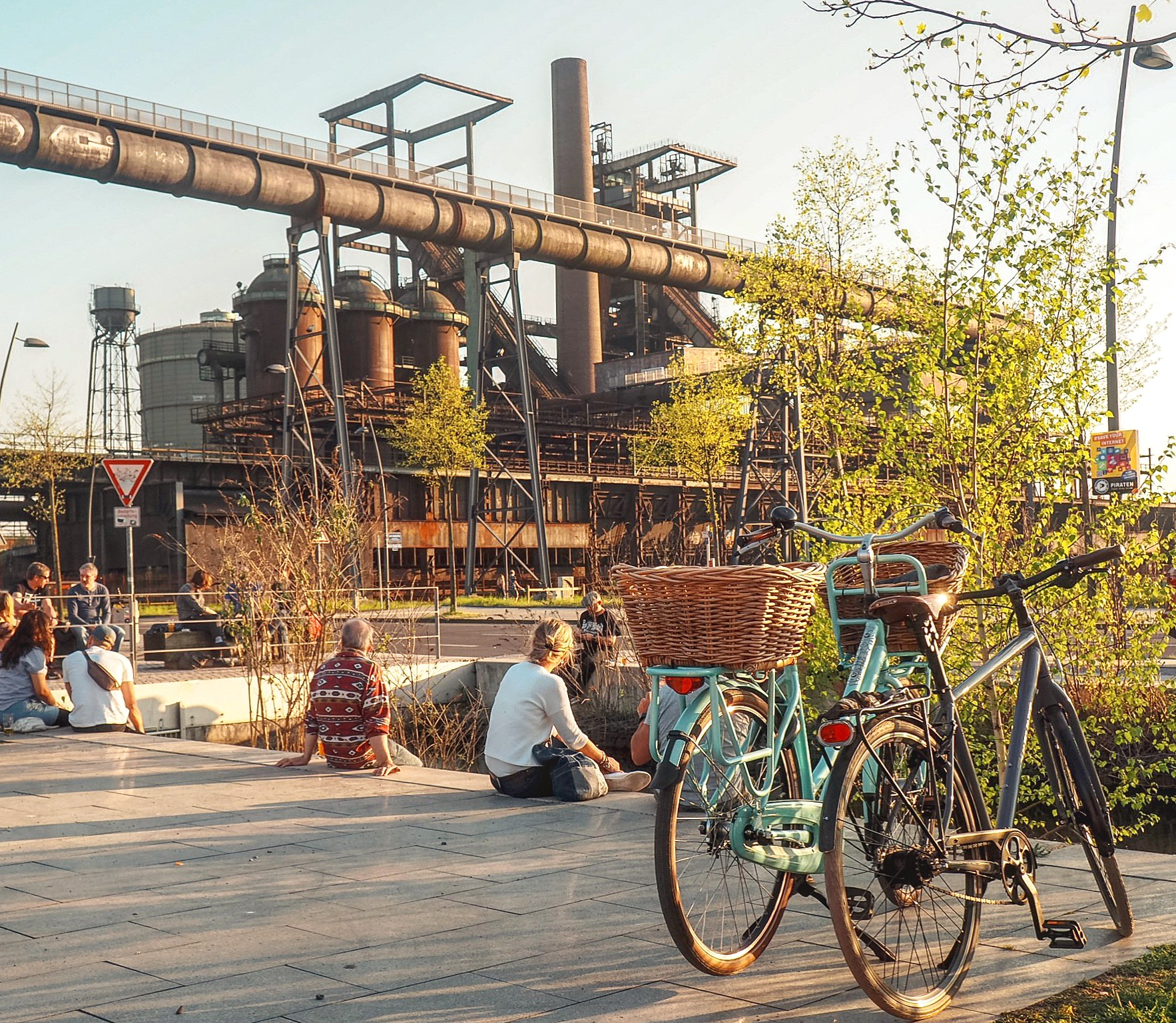 Zukunftsstandort Phoenix-West, Dortmund